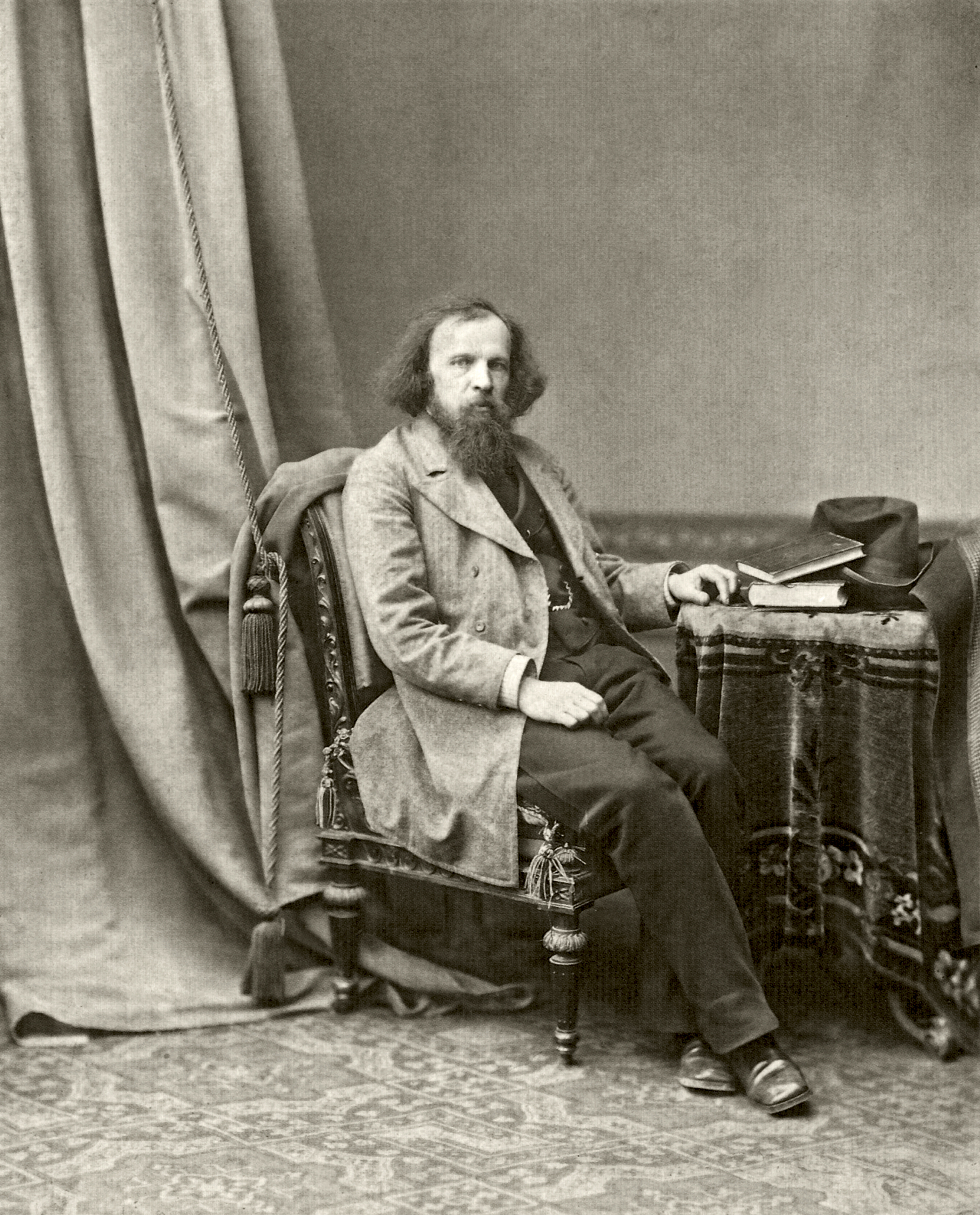 На фотографии известный русский ученый - Дмитрий Иванович Менделеев (1834 — 1907)